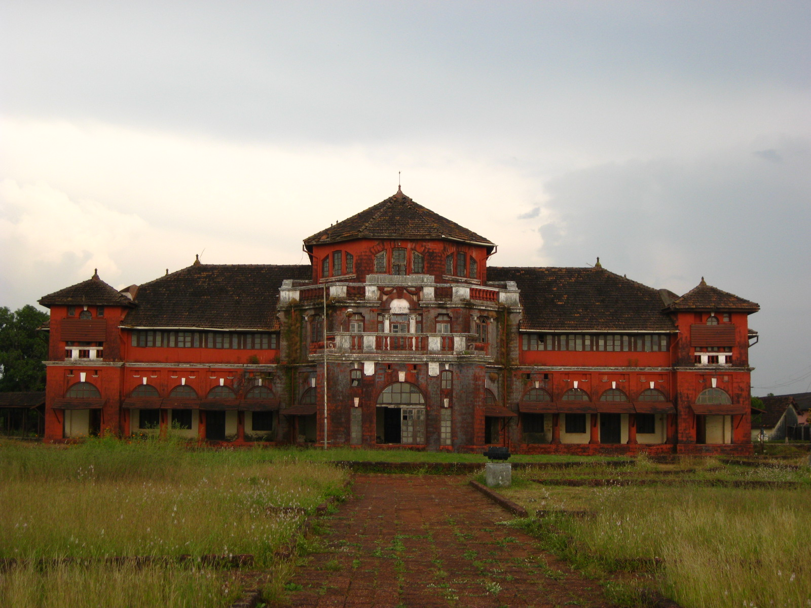 The Thibaw Palace in Ratnagiri, Maharashtra, India.